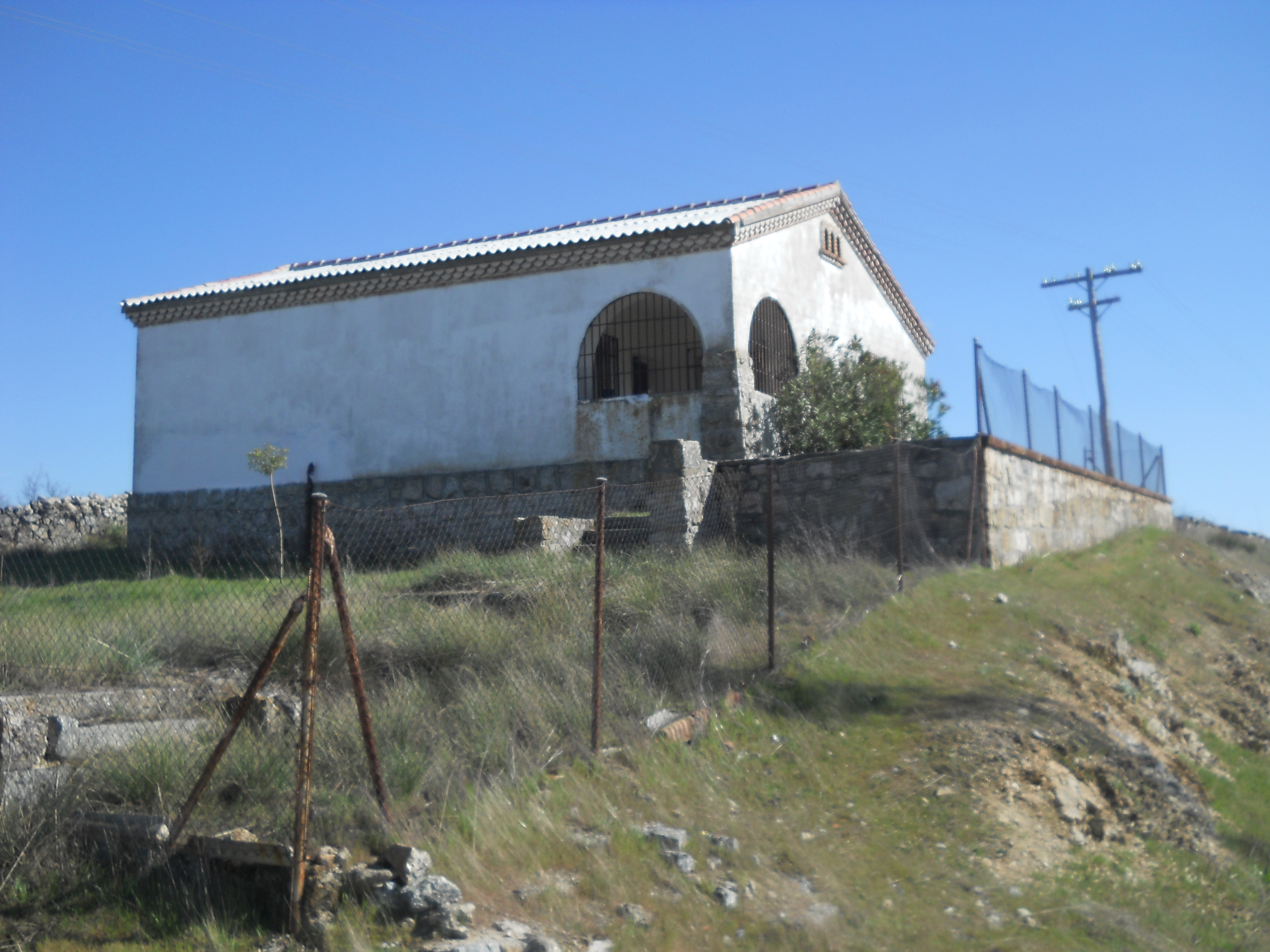 Antiguo apeadero de Soto del Real, Madrid, España